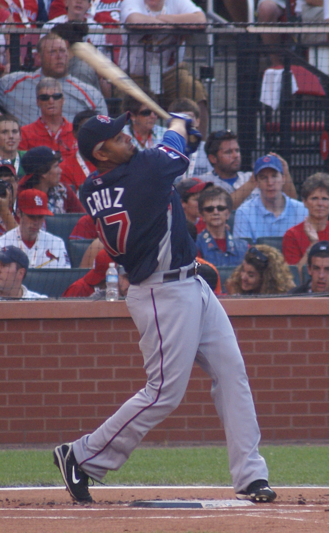 Nelson Cruz